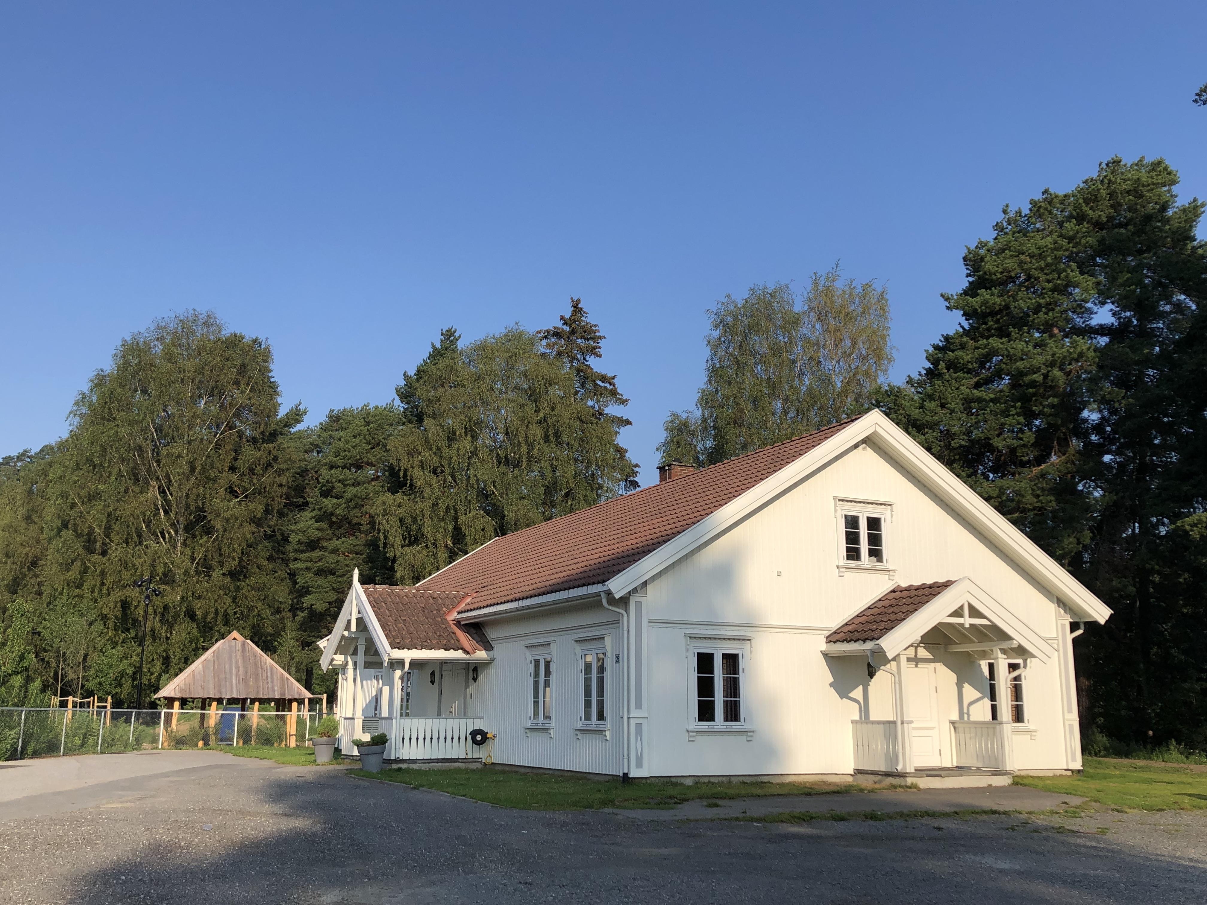 Benterudgata 26, Hønefoss.